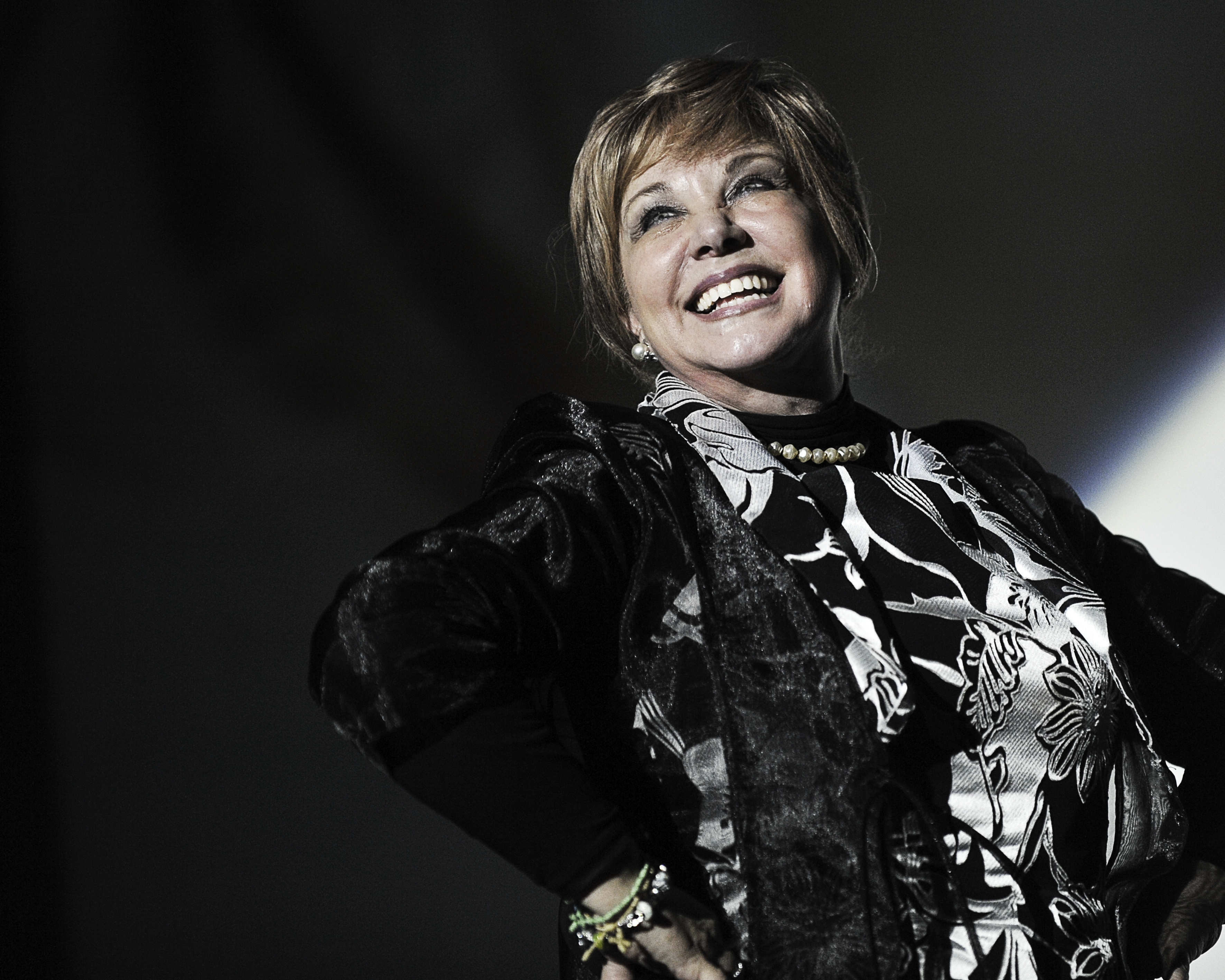 Actuación en el Teatro de Martos (Jaén)